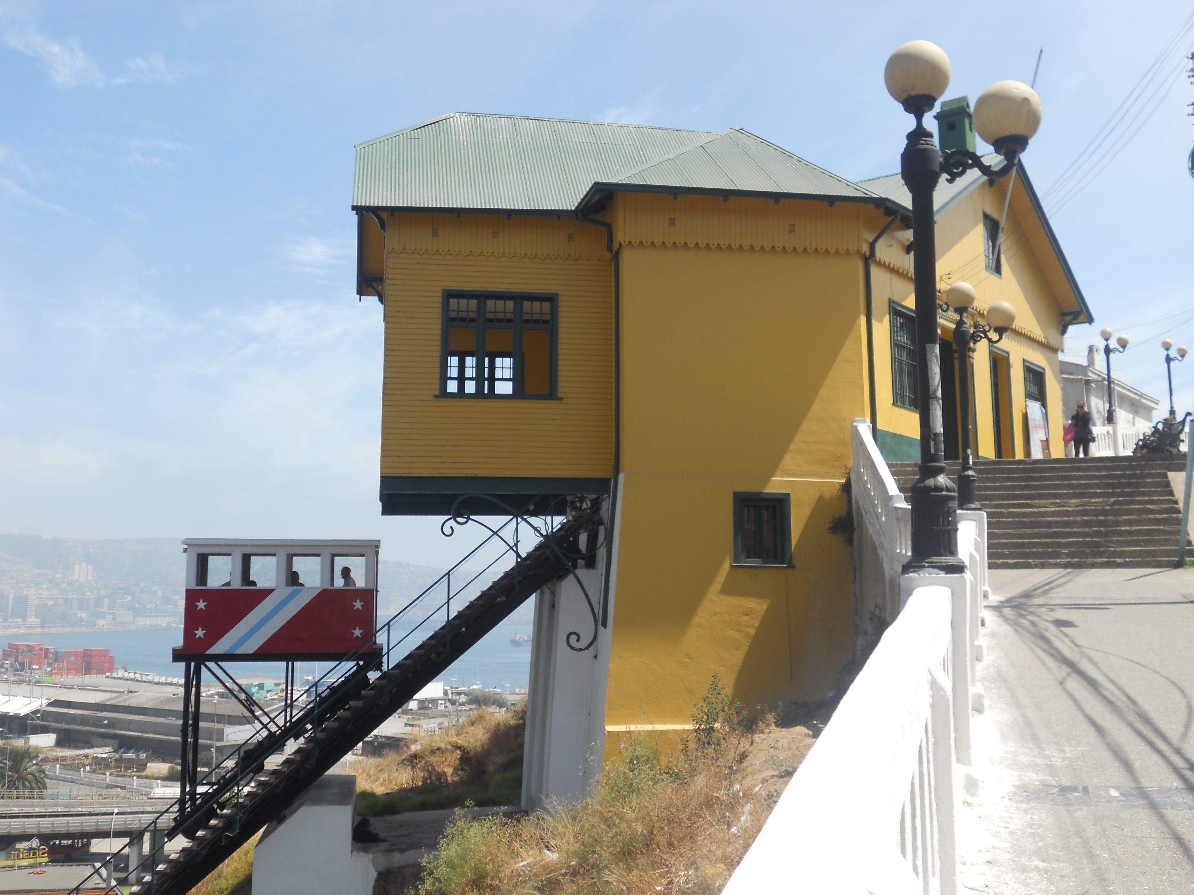 Ascensor Barón This is a photo of a national monument in Chile: 766